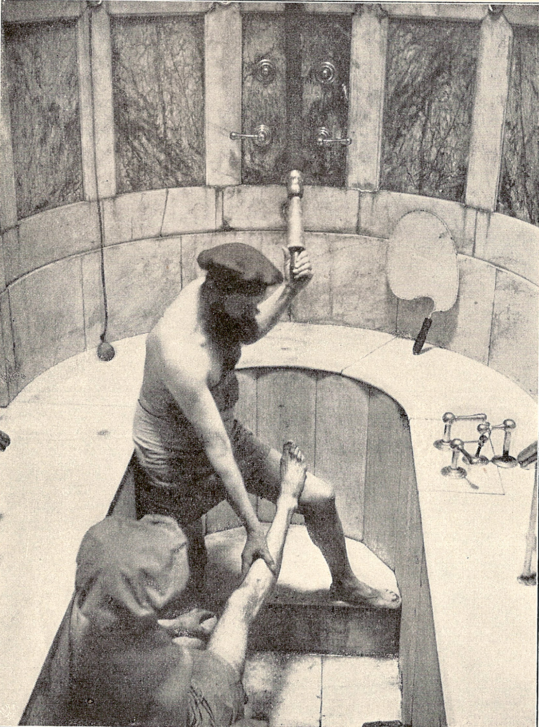 Thermalwasserdusche im Fürstenbad des Badehotels Kaiserbad. Ein Badediener massiert während der Thermalwasseranwendung die erkrankten Gelenke.